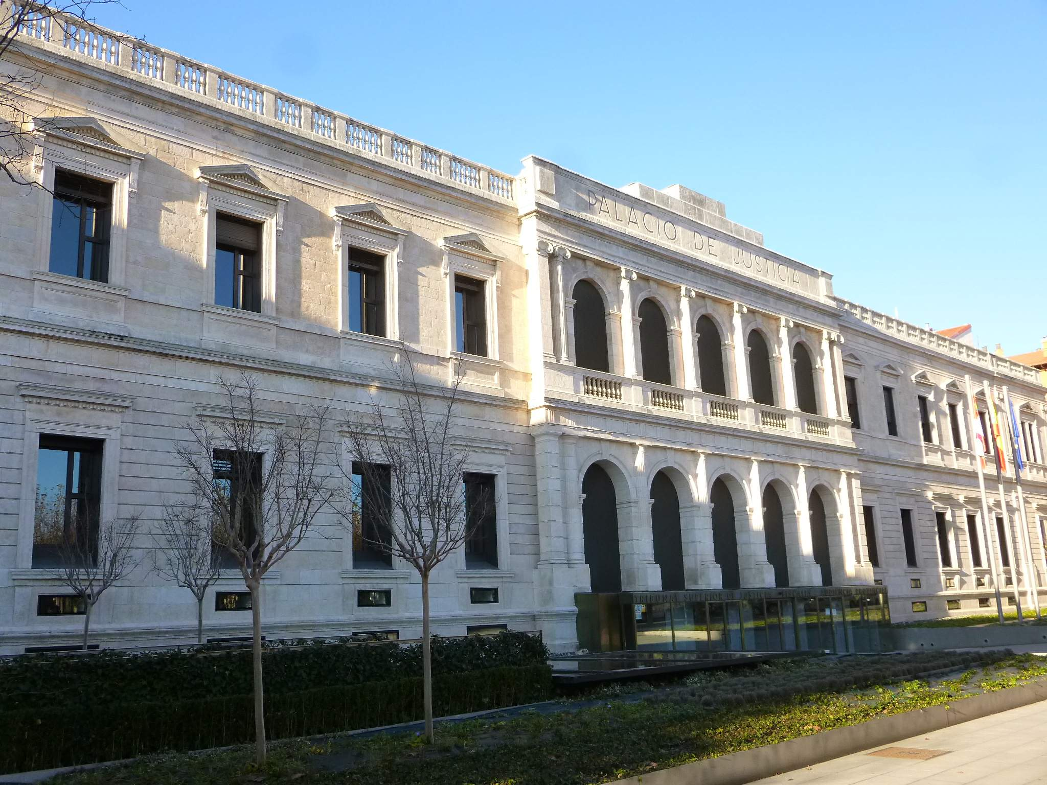 Burgos - Palacio de Justicia